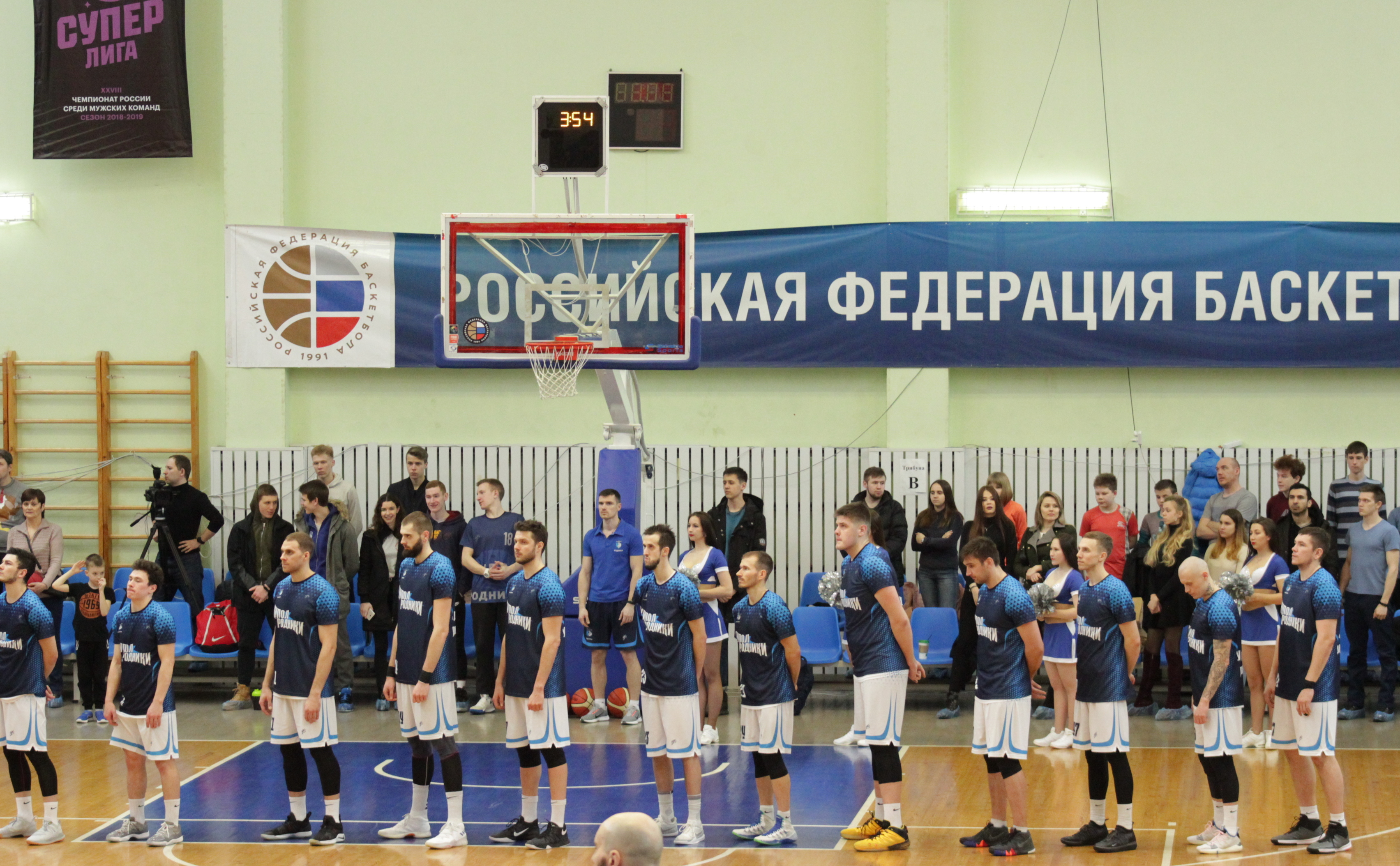 Игроки БК Купол-Родники на приветствии перед матчем регулярного чемпионата Суперлиги БК Купол-Родники против БК Университет Югра 17 марта 2019 года